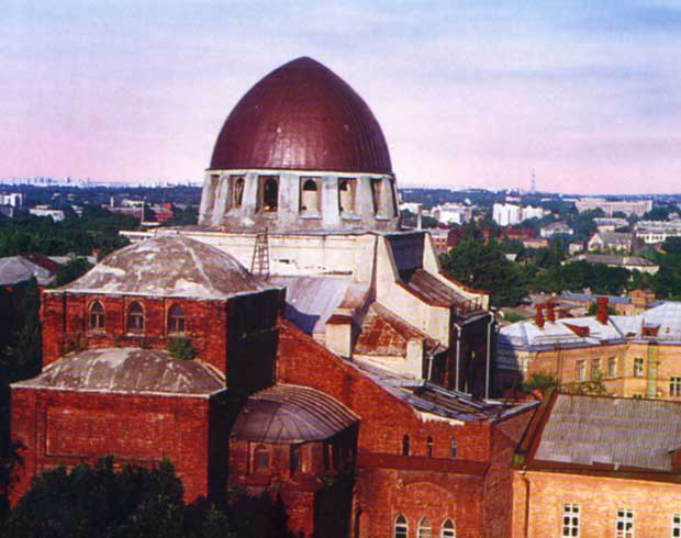 Charkow synagogue